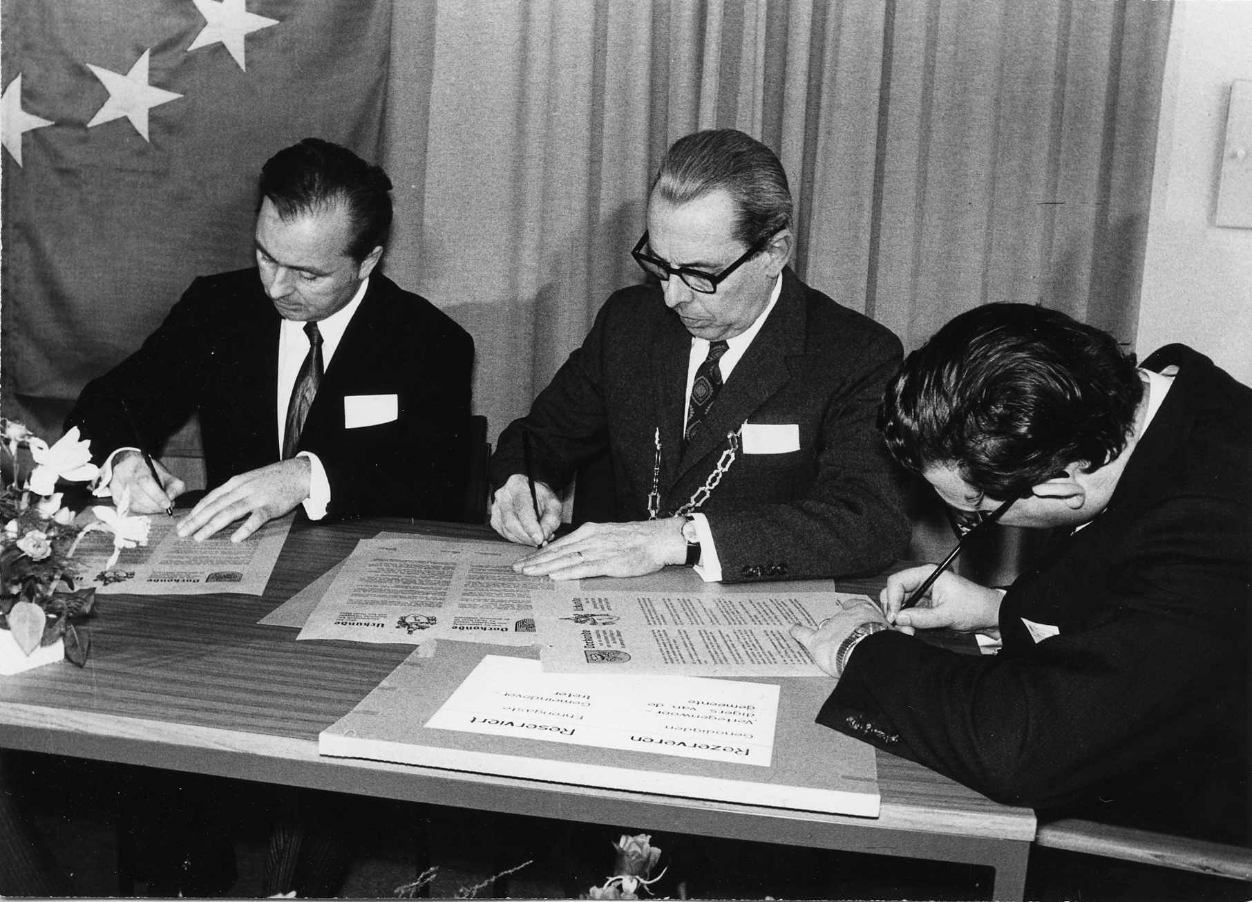 Ondertekening van de oorkonde, waarmee de voorgenomen samenwerking en vriendschap tussen de gemeente Ubbergen en de Westduitse gemeente Rees wordt bekrachtigd. Van links naar rechts Bürgermeister J. Tasch, burgemeester W.S. Hermsen en gemeentesecretaris C. Geus